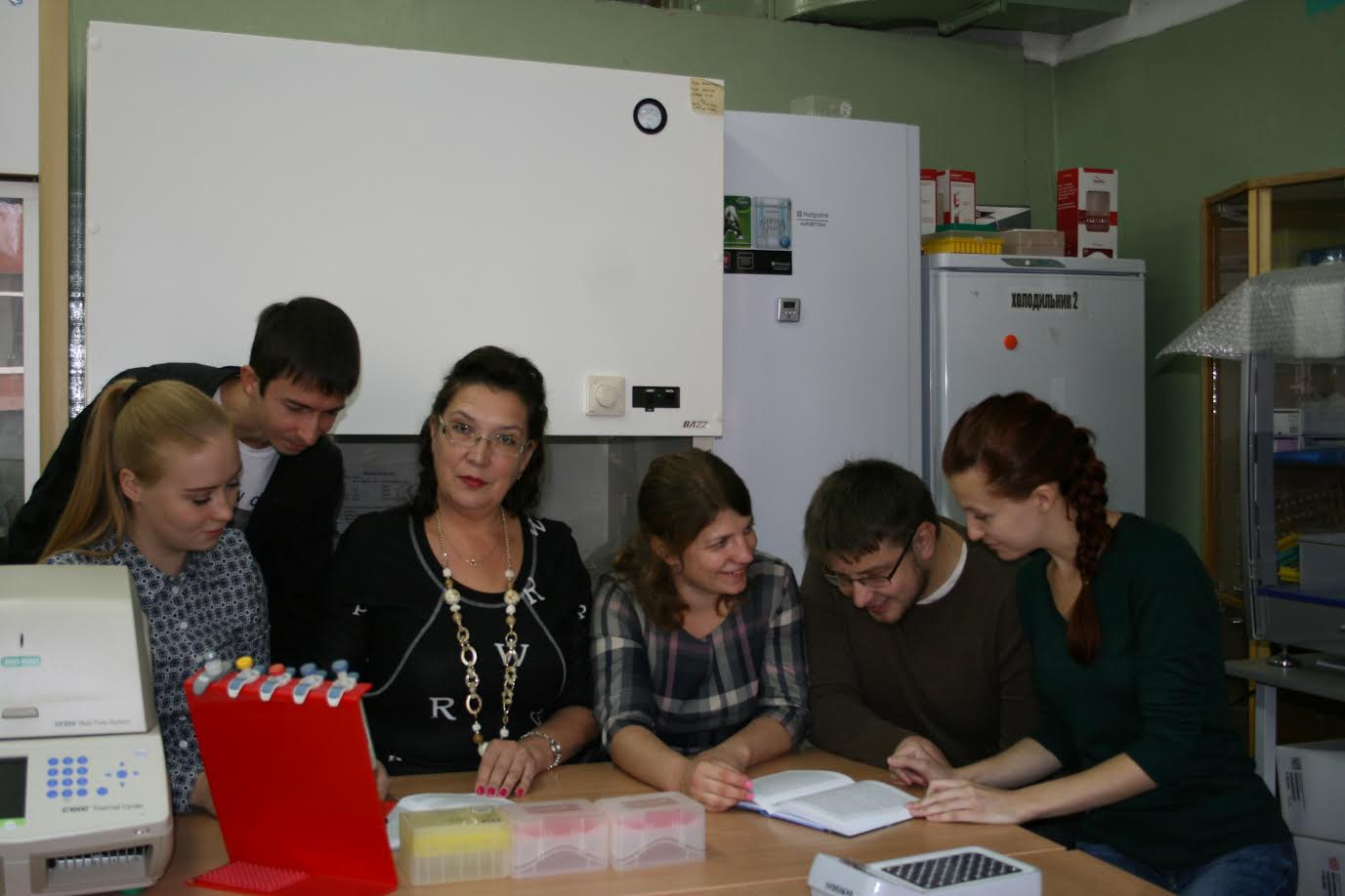 Светлана Витальевна Боронникова с коллективом аспирантов